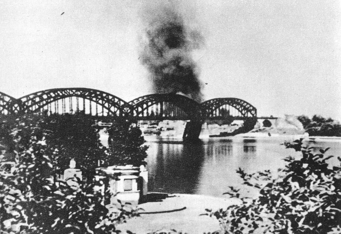 Most średnicowy podczas obrony Warszawy we wrześniu 1939